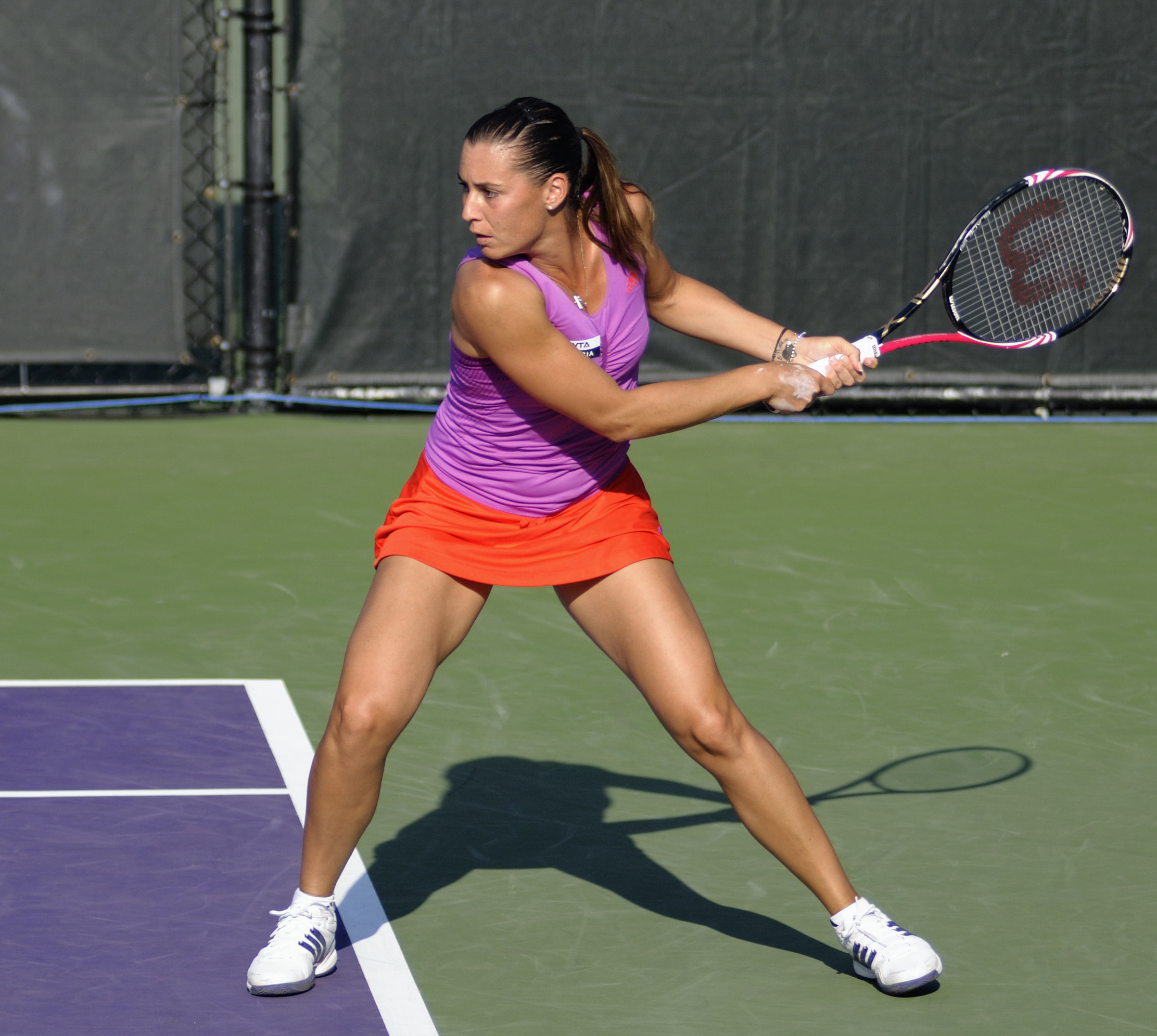 Emiliàn e rumagnòl: La Flavia Pennetta tòlta śò durànt al Sony Eriksson Open dal 2012